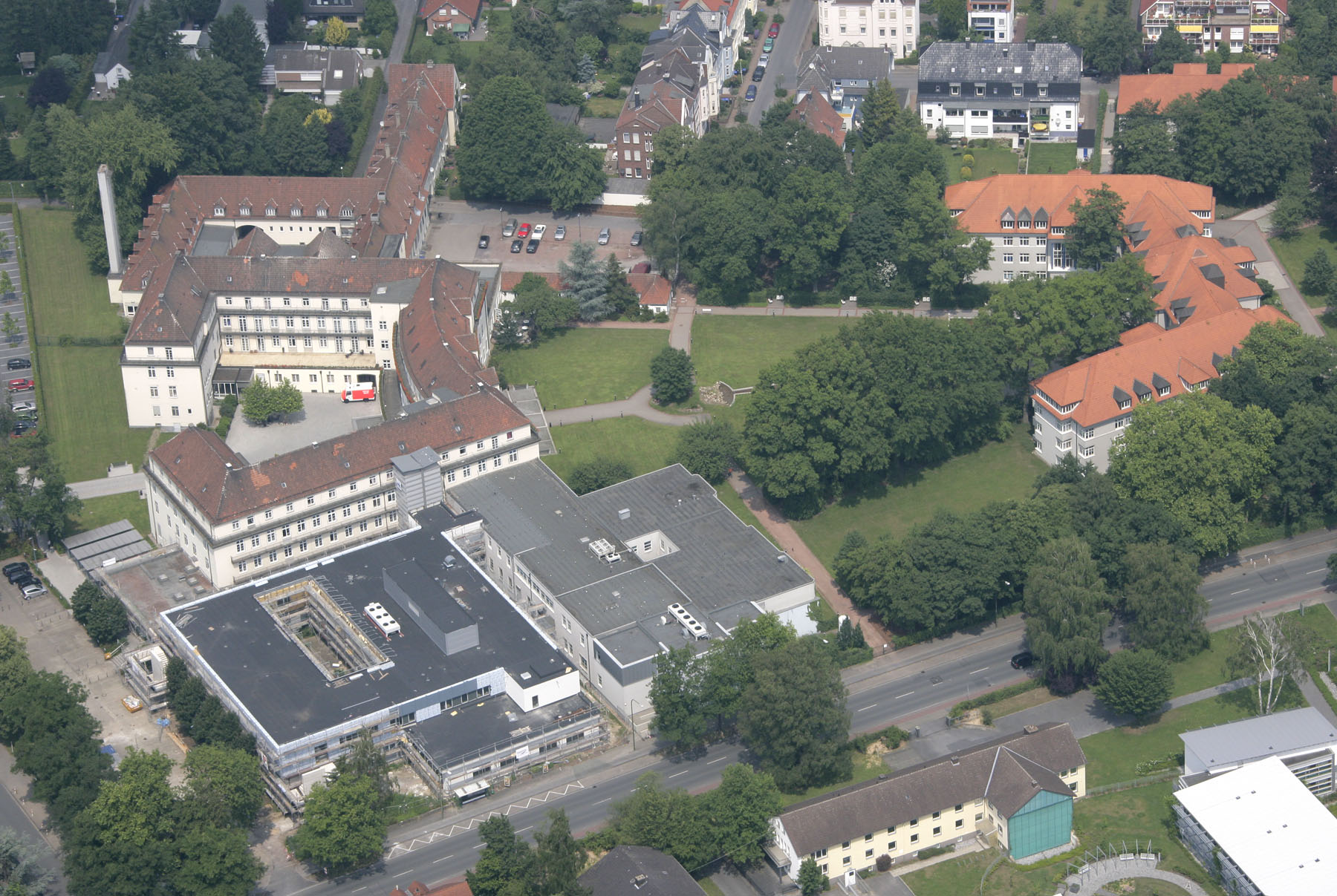 Luftbildaufnahme Hamm